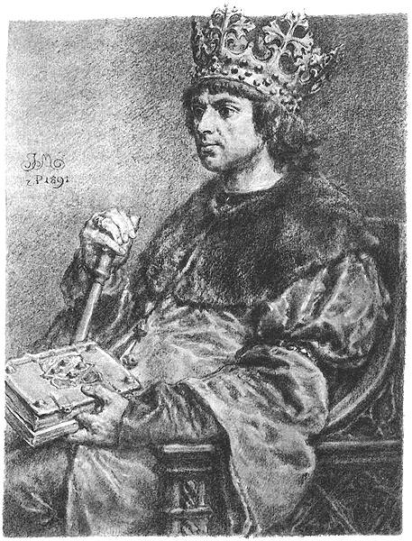 Part of series Poczet królów i książąt polskich.